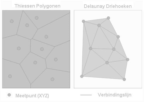 Figuur 3.0: Thiessen Polygonen en Delaunay driehoeken.